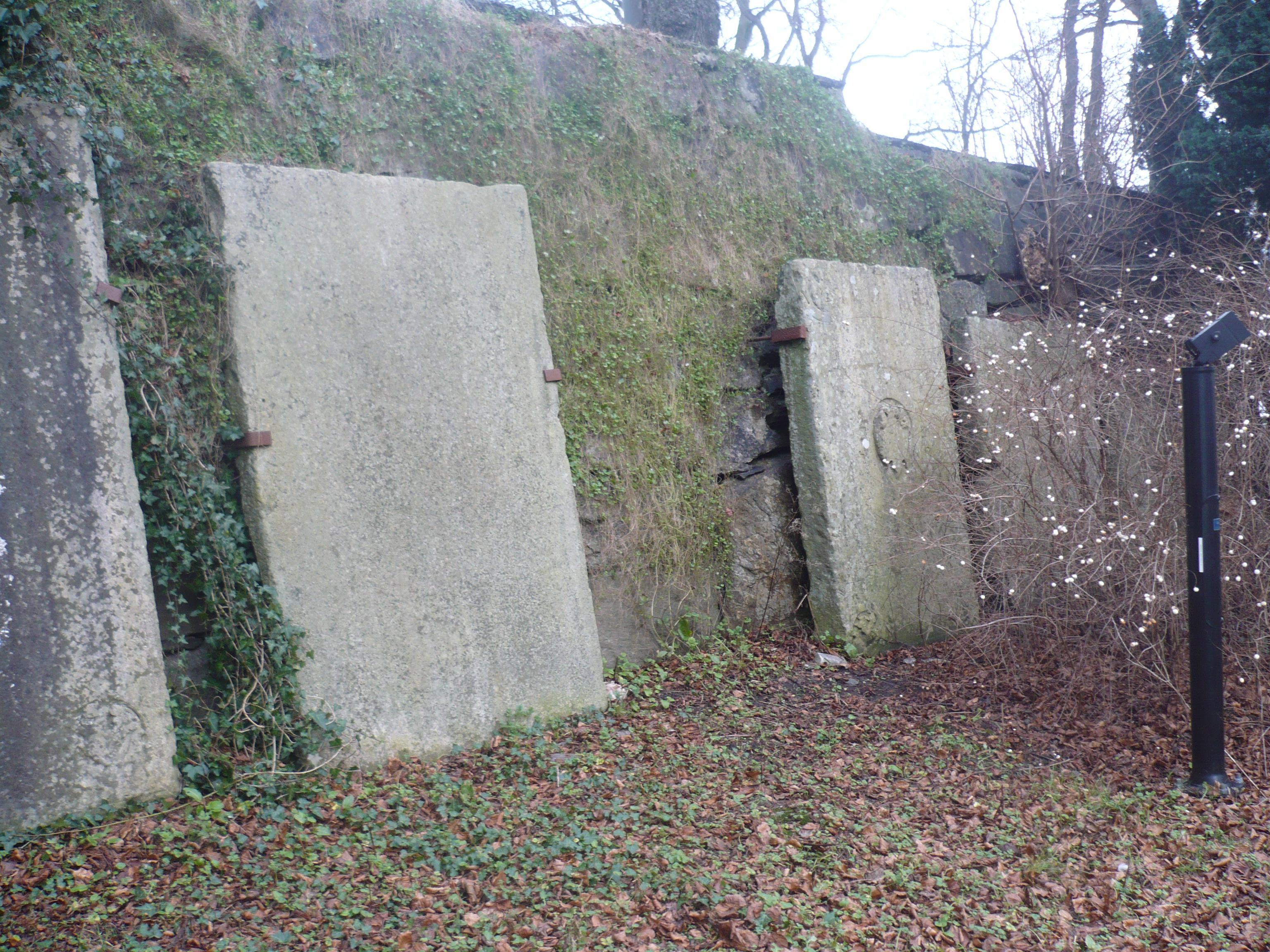 Gravsteiner fra krypten i Stavanger domkirke. De står nå oppstilt i Rektorhagen på Kongsgård, inn mot Bispekapellet (Munkekirken).